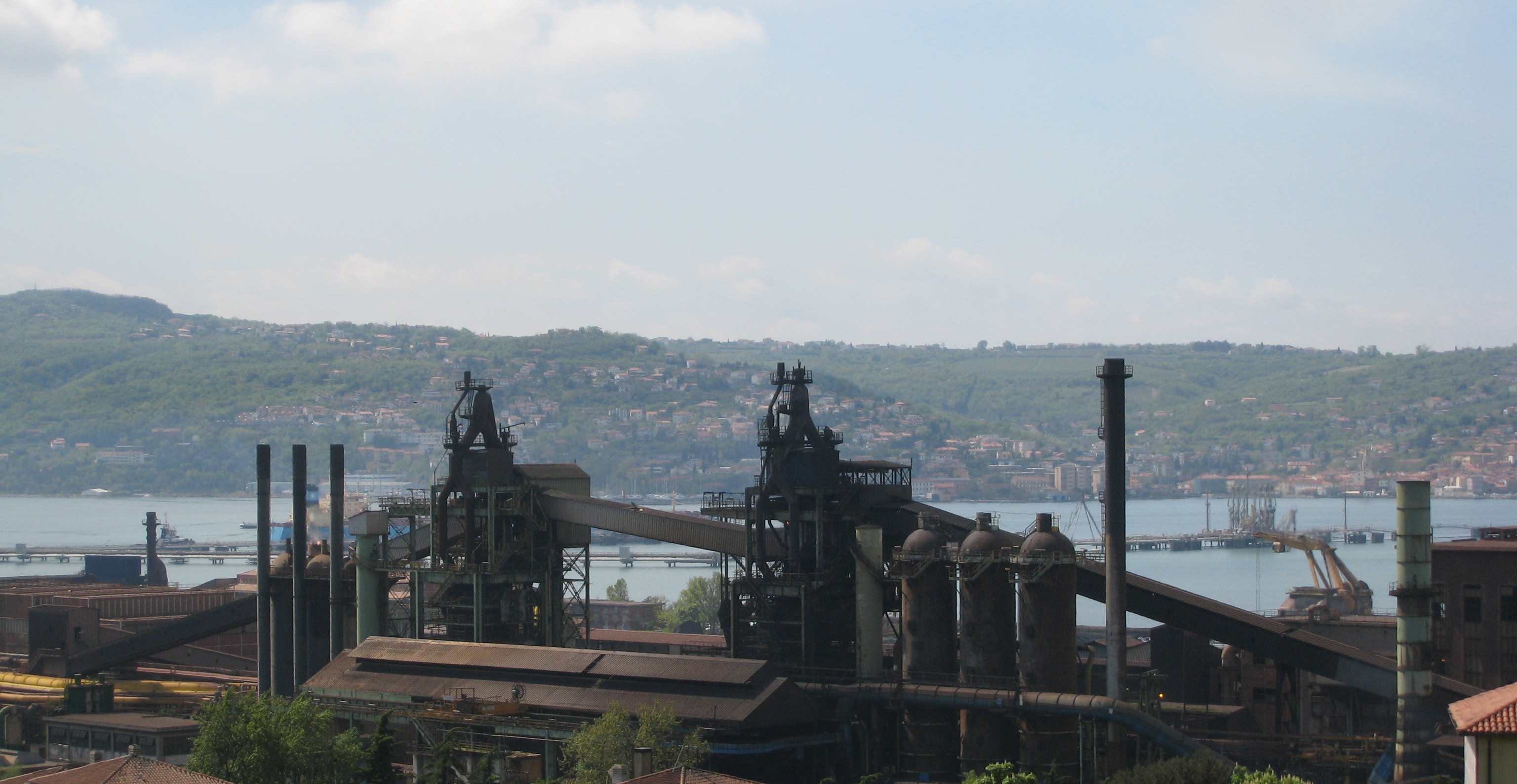 Ferriera di Servola a Trieste. Aprile 2008